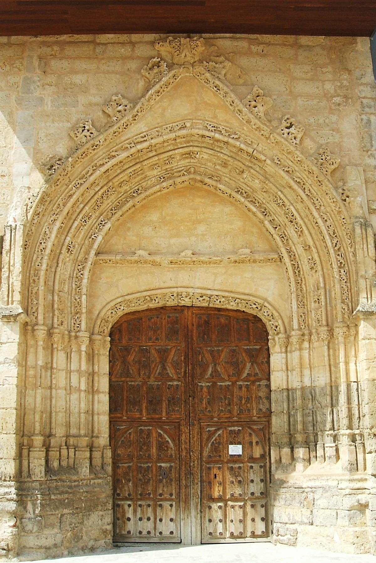 Portada tardogótica de la antigua iglesia de San Martín, hoy habilitada como Centro de Interpretación de Tierra de Campos, en Paredes de Nava, Palencia, Castilla y León, España